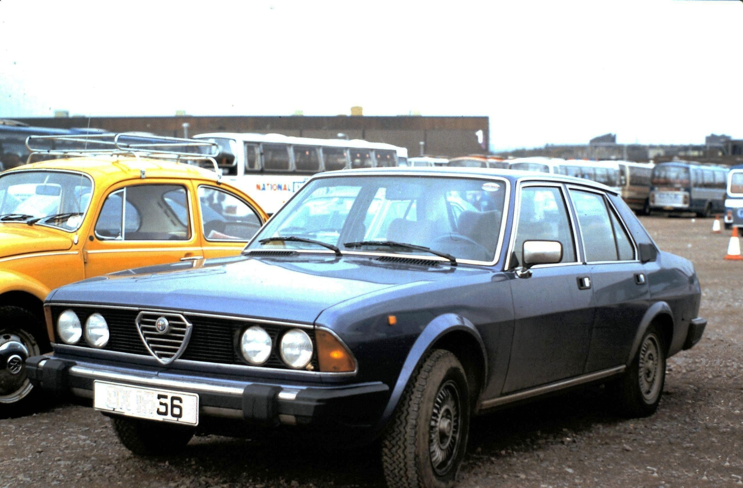 Alfa Six